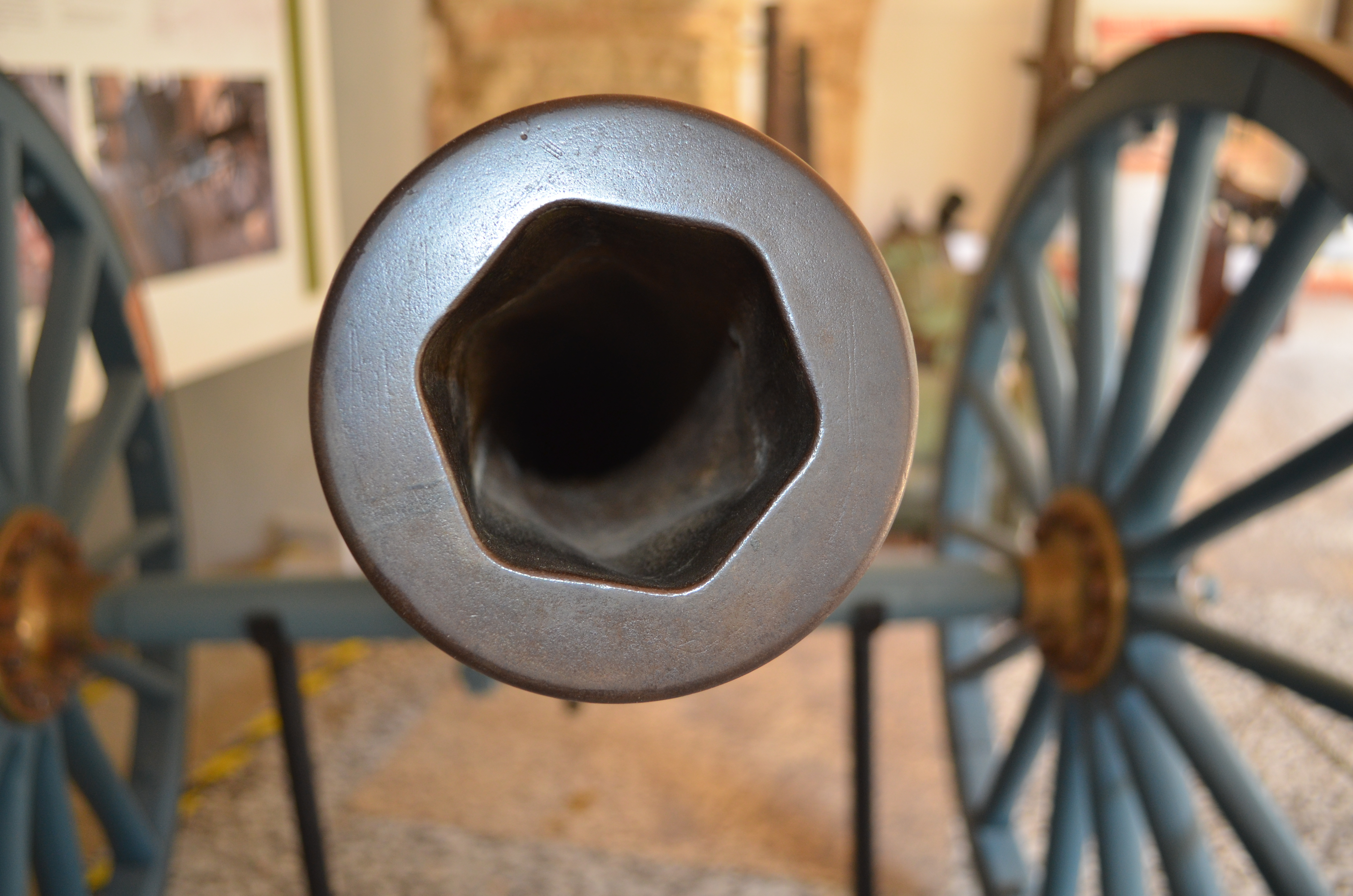 Cañón Whitworth del bando Carlista